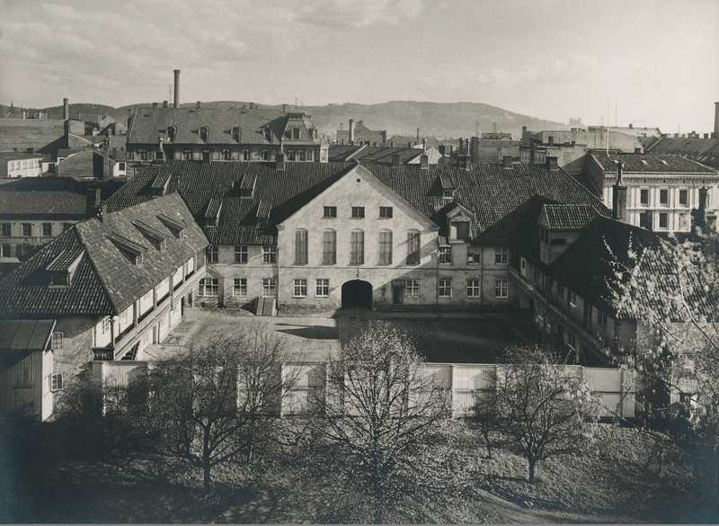 Tukthuset i Storgata 33 i Oslo